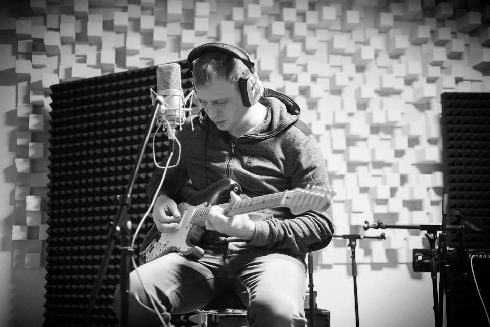 kytarista skupoiny premier